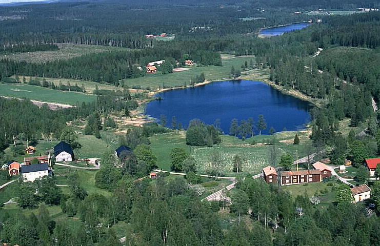 Motiv: Västgöthyttan Nyckelord: Flygbilder, Riksintressen Kategori: BergslagsmiljöVästgöthyttan